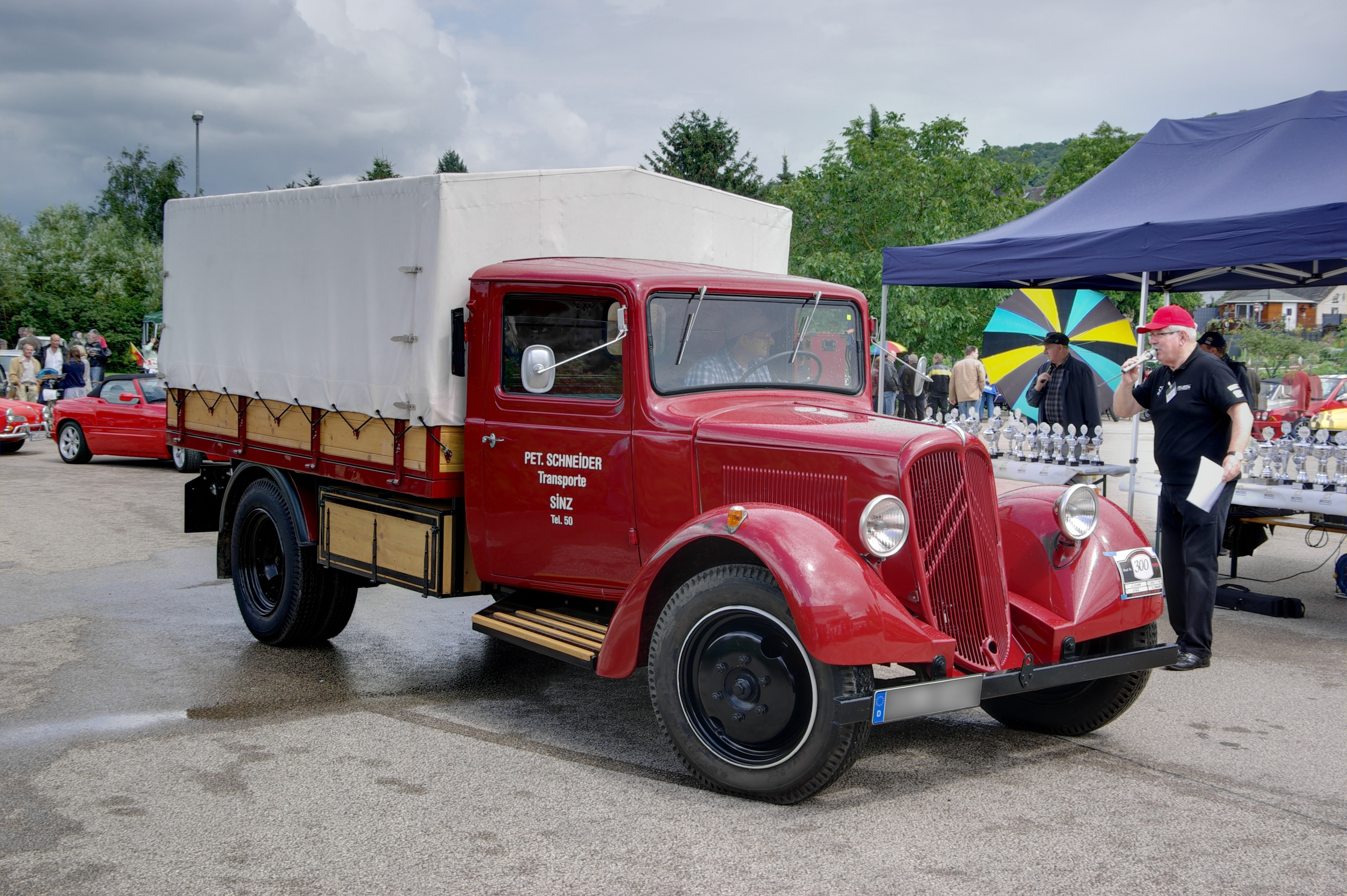 Citroën U 23, Baujahr 1949, 48 PS, 28. Internationales Oldtimer-Treffen, Konz